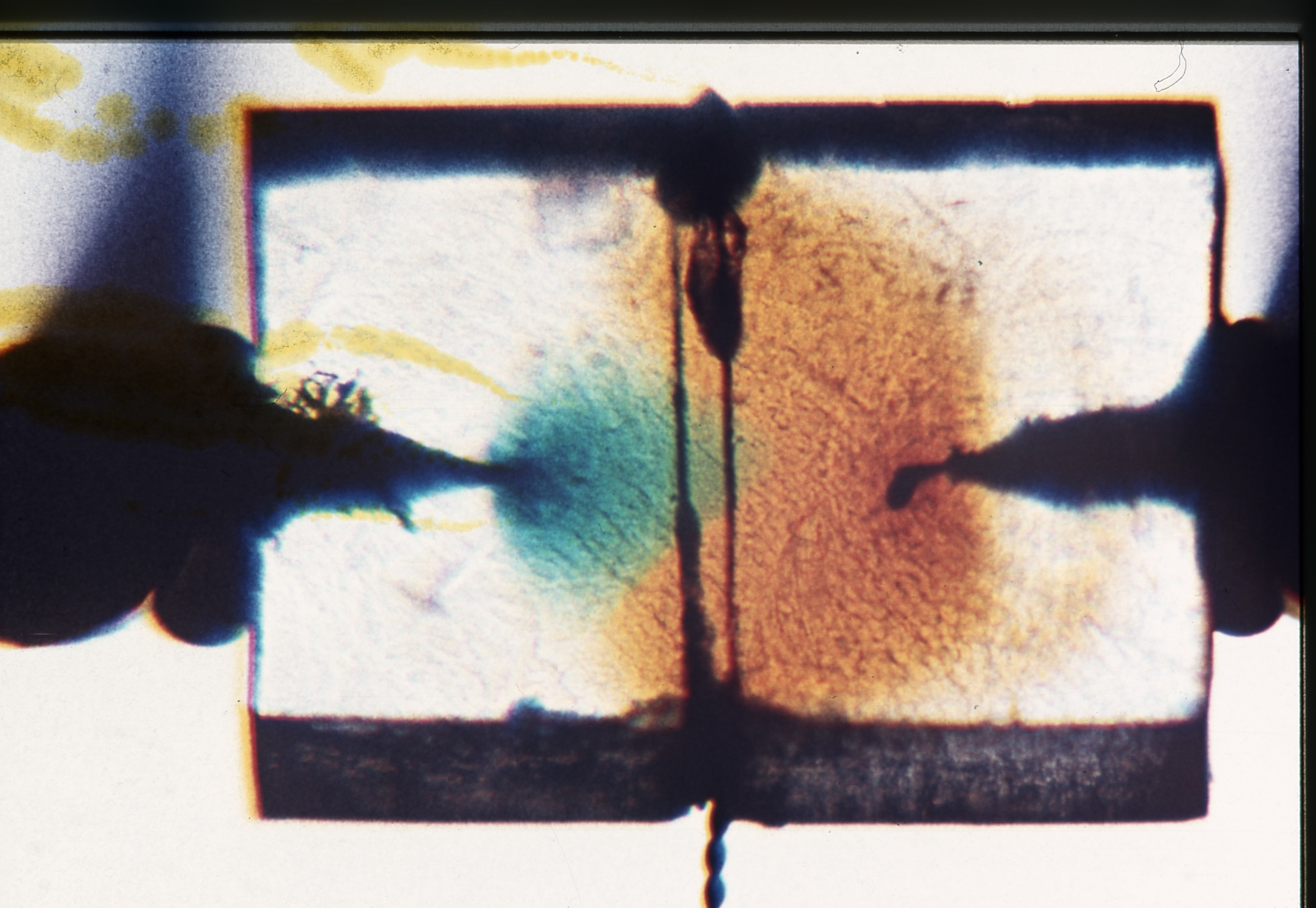 Sichtbarnachung links von n-Leitung (durch Elektronen, grün) und rechts von p-Leitung (durch Defekt-Elektronen, braun) in einem KJ-Kristall. Kathode (links) und Anode (rechts) sind in den Kristall eingeschmolzene Pt-Spitzen. R. Pohl, „Elektrizitätslehre“, von der 10. Aufl. (1944) an.